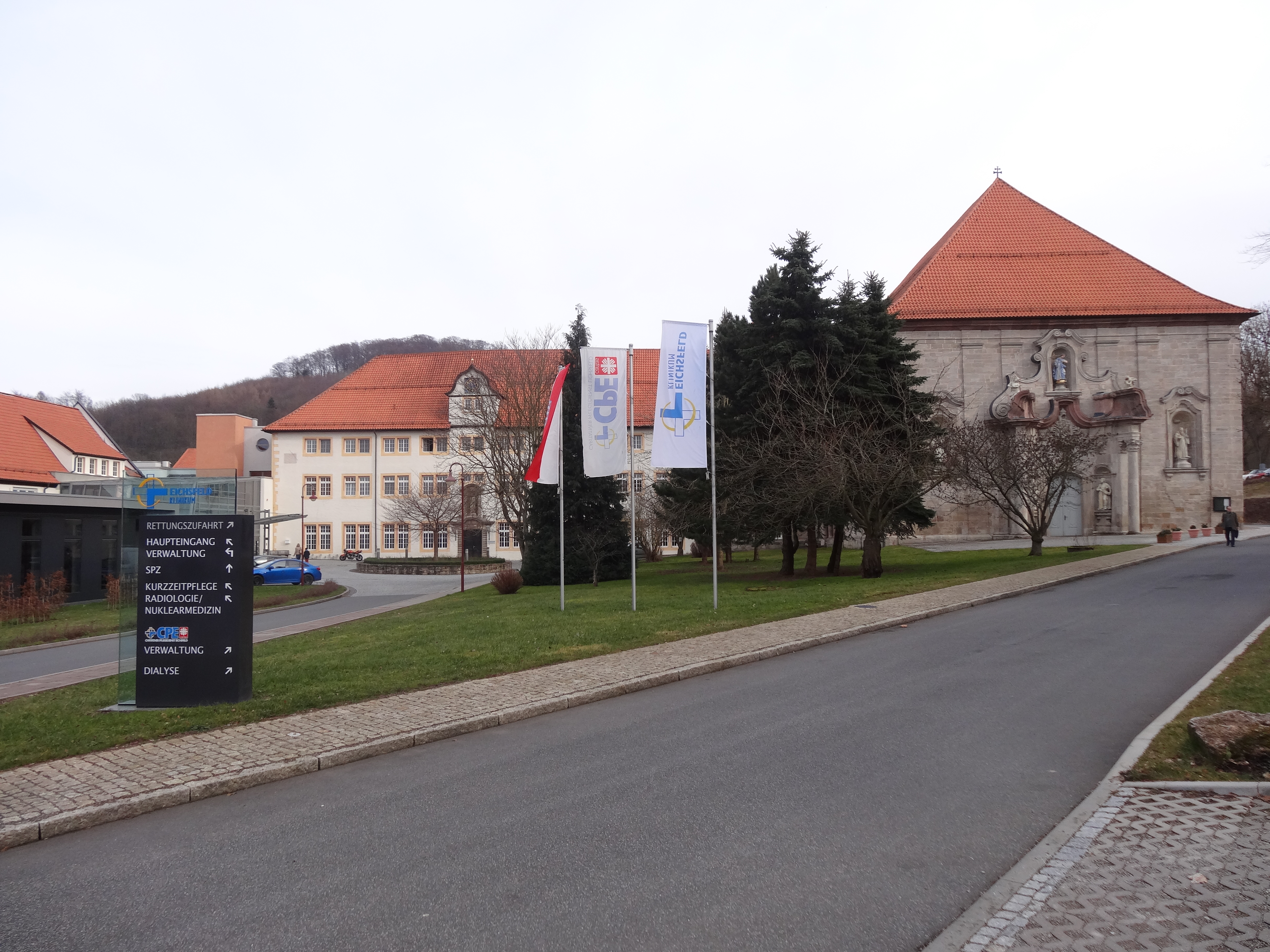 Eichsfeldklinikum in Reifenstein